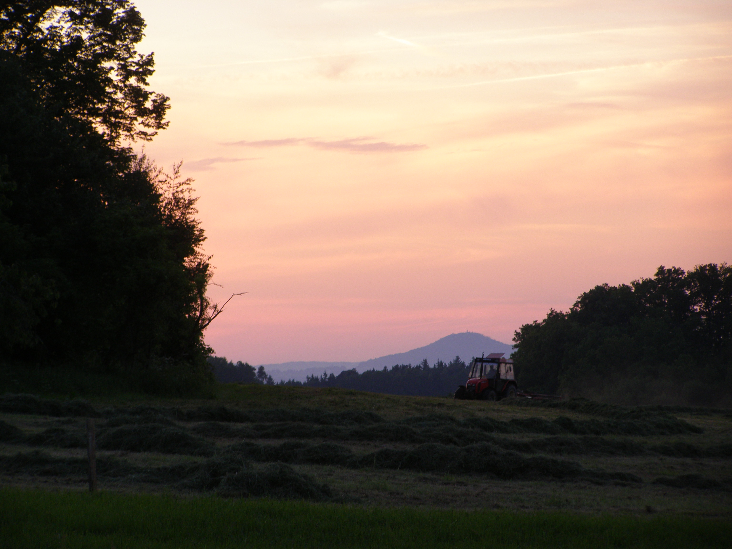 Pertoltice, lokalita Nové Pertoltice, traktor obracející seno